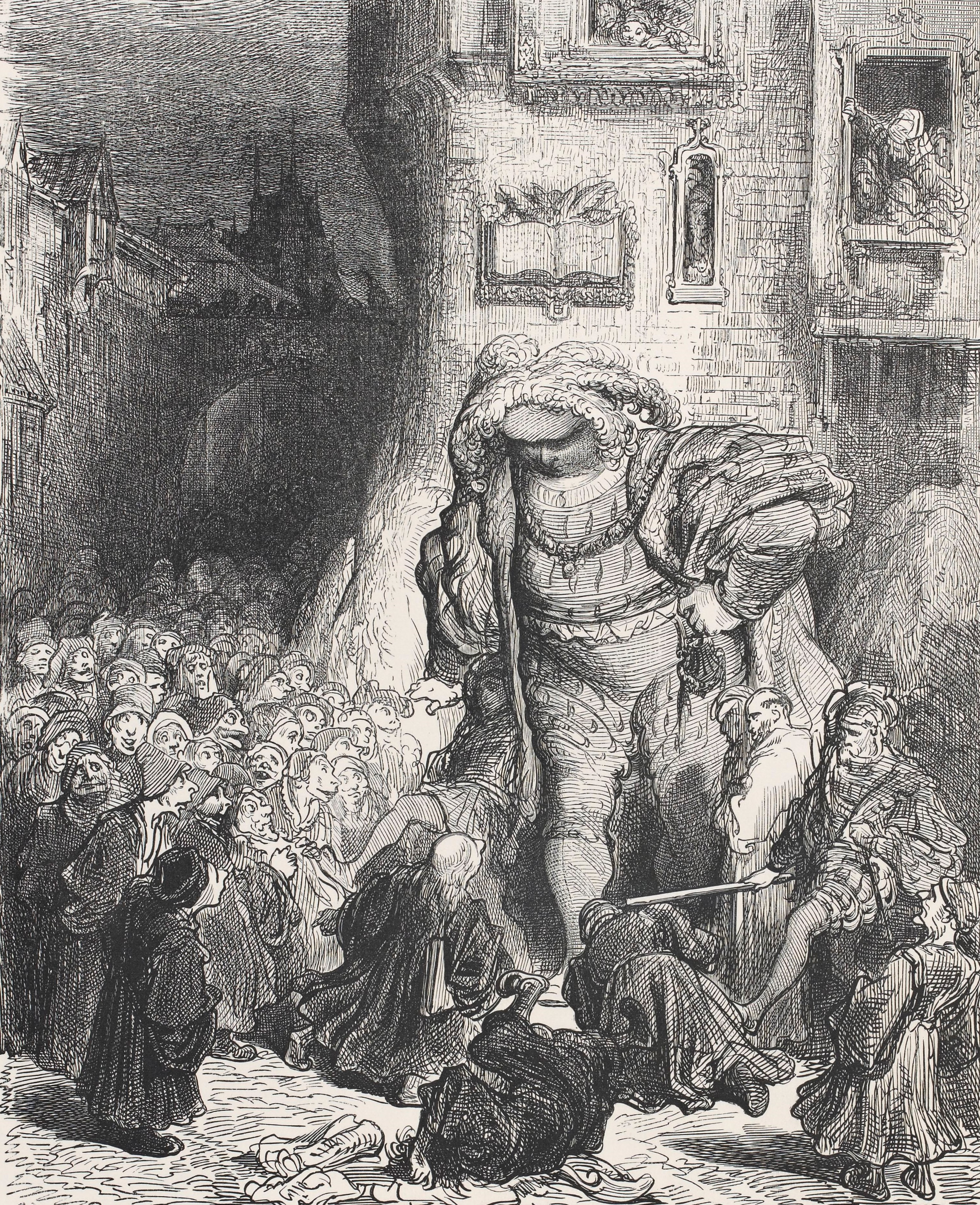 Les Chicanous gagnent leur vie en étant battus. Illustrations de Gustave Doré en 1873, éditions Garnier Frères